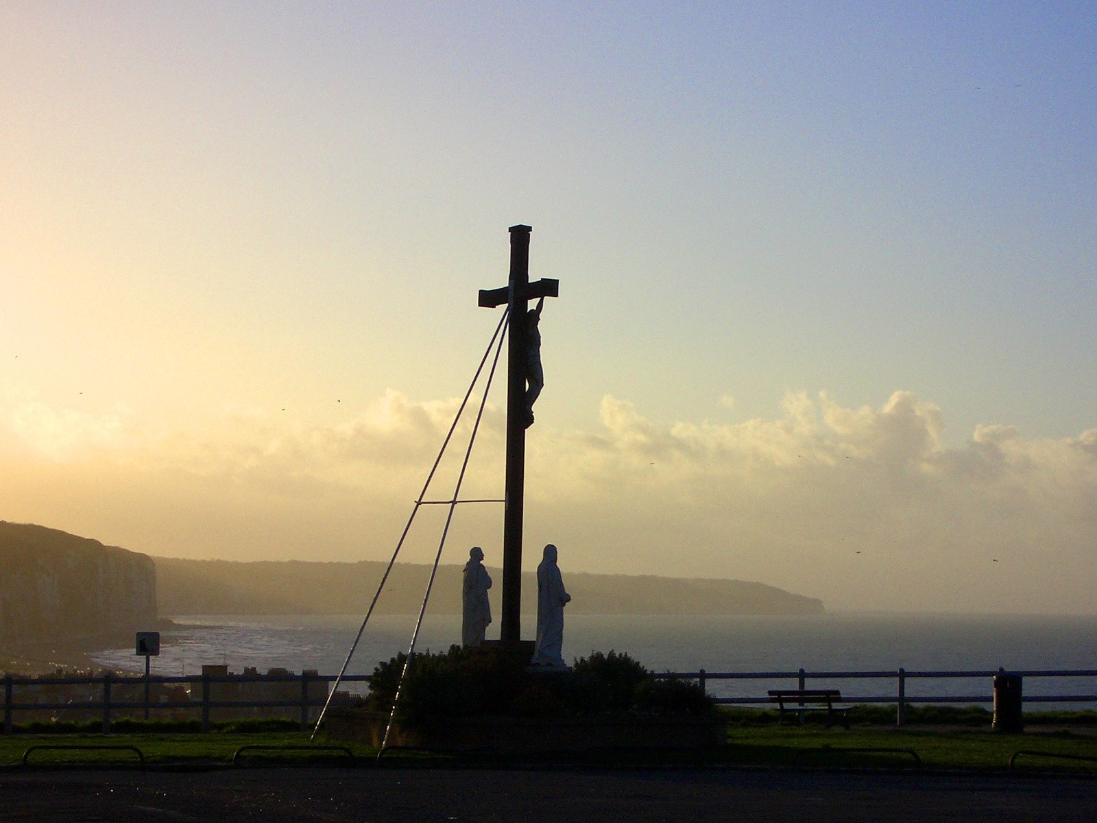 Foto gemaakt vanaf een rots. Op de achtergrond ligt de haven van Dieppe. Foto gemaakt door Pim Zeekoers, 2004.